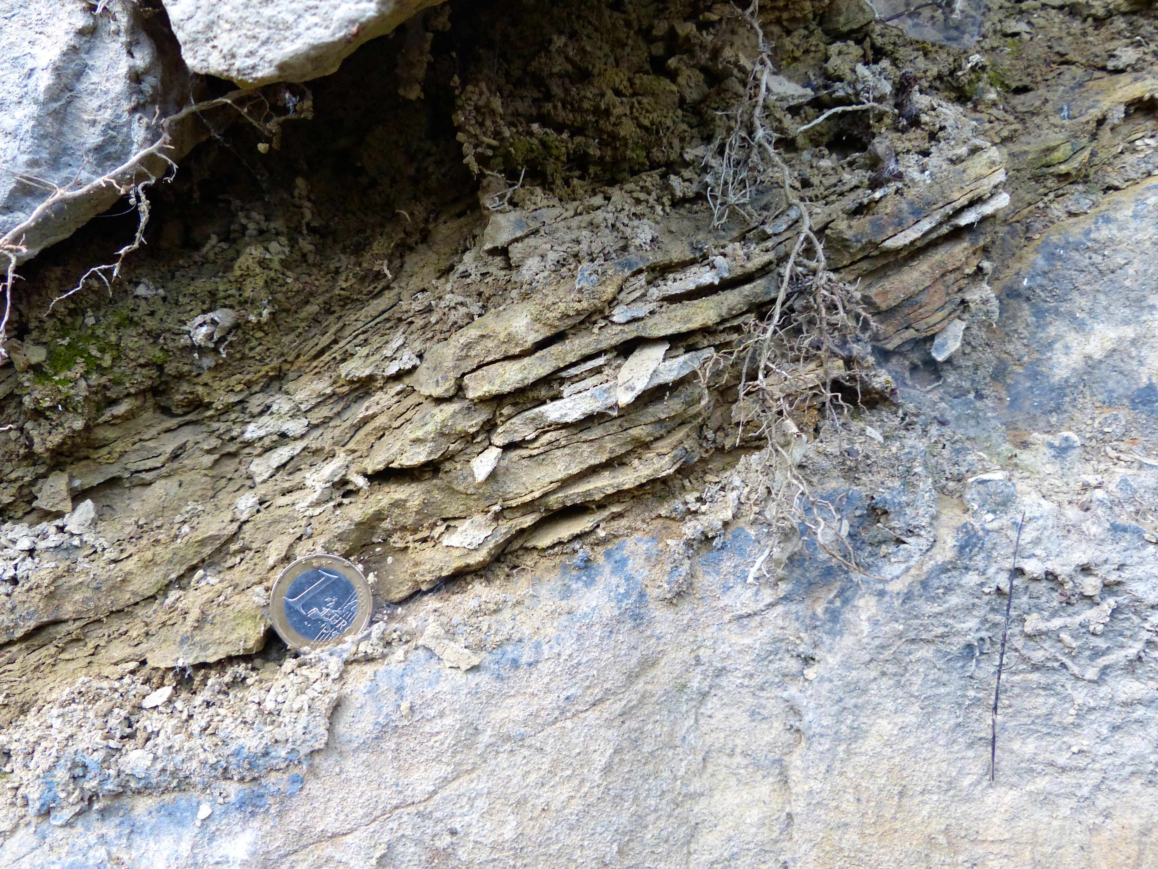 Geotop Illerdurchbruch Oberkottern: Detailaufnahme "Granitische Molasse" (Untere Süßwassermolasse): Mergellage (ockerfarben) zwischen Sandsteinen (Hellgrau)